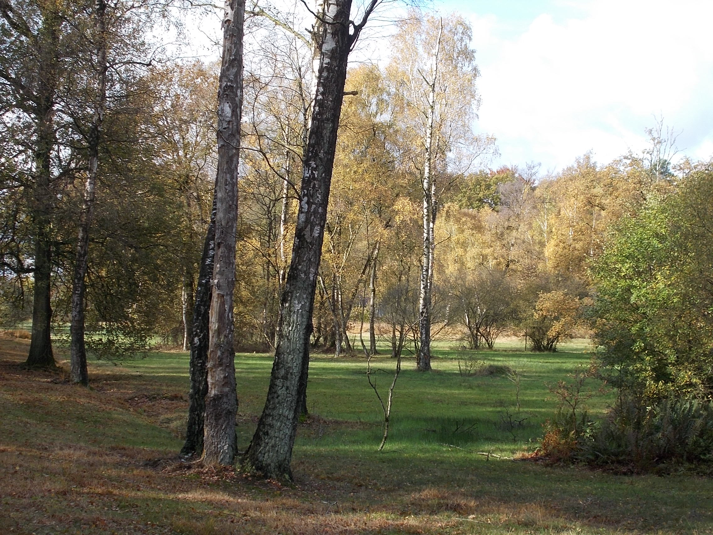 Natuurreservaat De Slenk op landgoed Het Oostermaat bij Lettele. Vochtige hooilanden in de vorm van bosweide